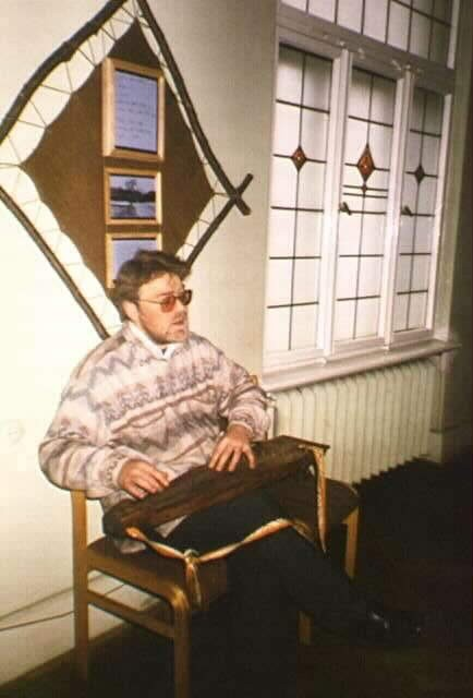 Strängaspel i Riga, Lettland. En folkmusiker knäpper på sin kokle och sjunger dainasdikter.